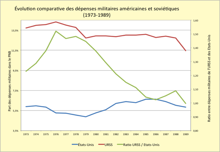 Graphique illustrant l'évolution comparative des dépenses militaires des États-Unis et de l'Union soviétique de 1973 à 1989. Les données source sont extraites des rapports annuels "World Military Expenditures and Arms Trade" publiés par le Département d'État des États-Unis